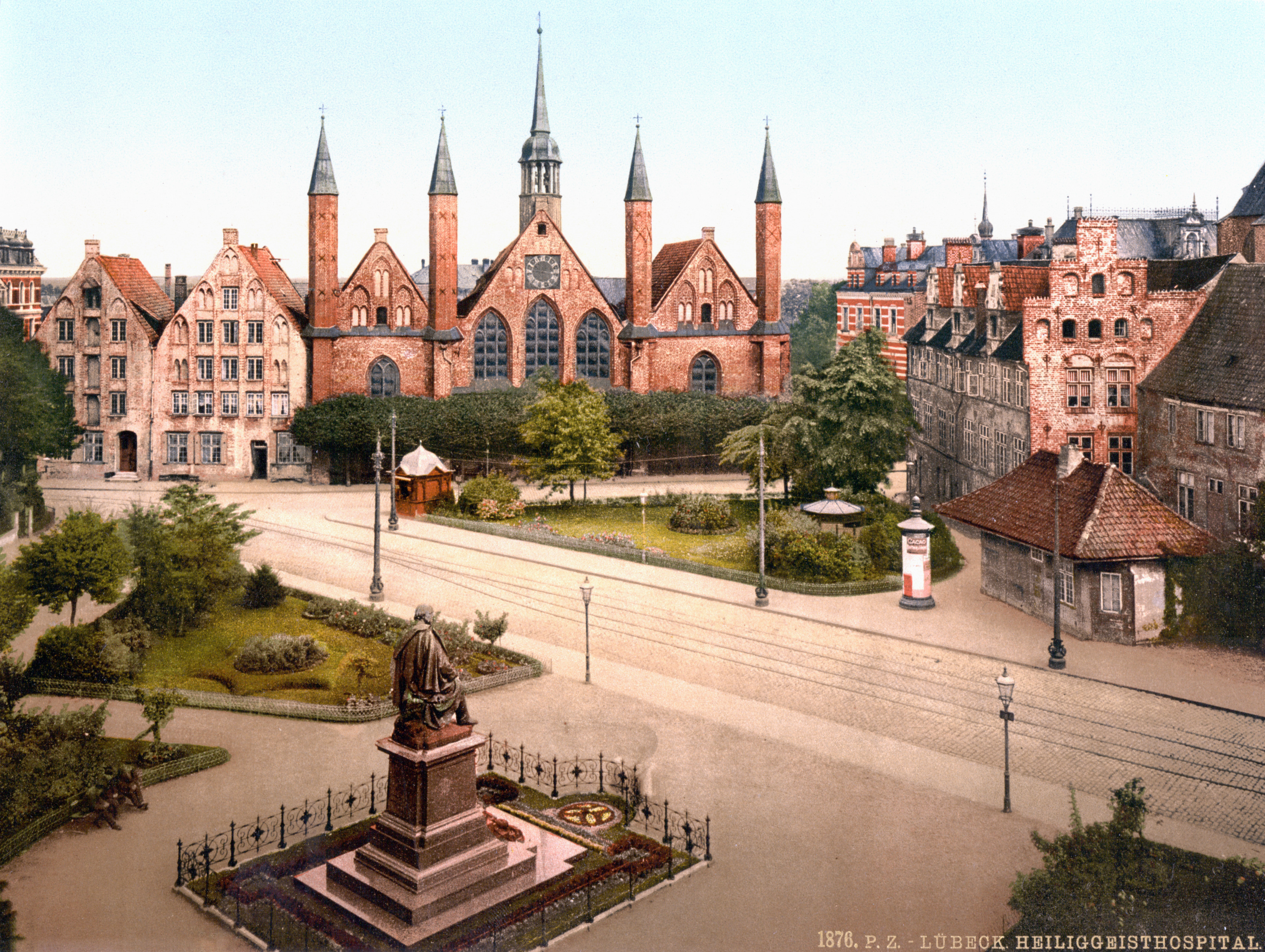 Lübeck Heiliggeisthospital